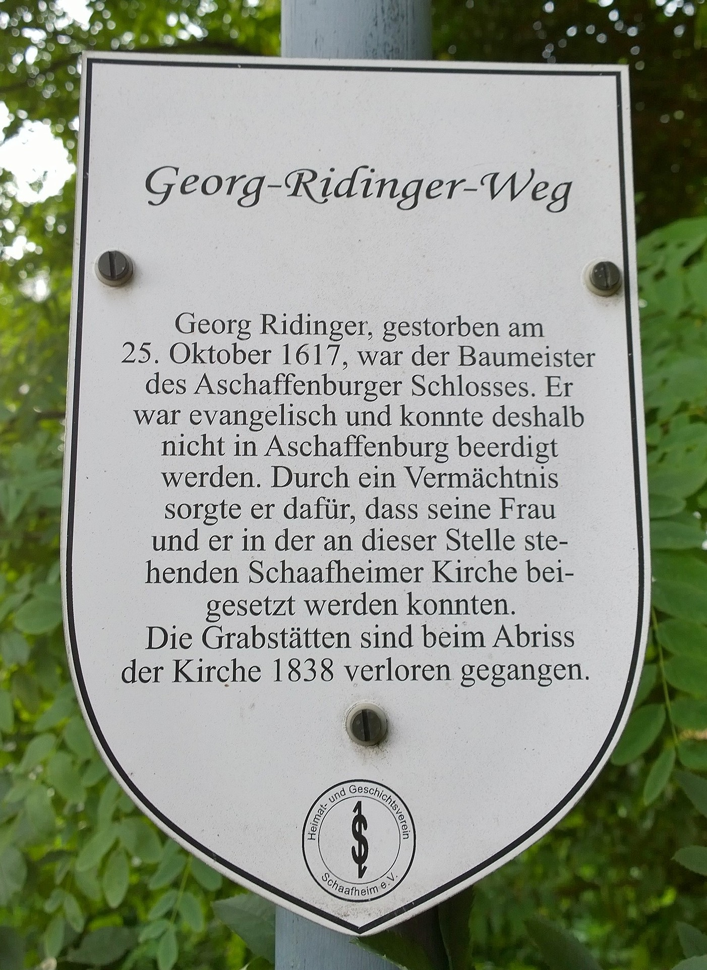 Tafel mit Hinweisen zu Georg Ridinger am Standort der alten niedergelegten Kirche von Schaafheim